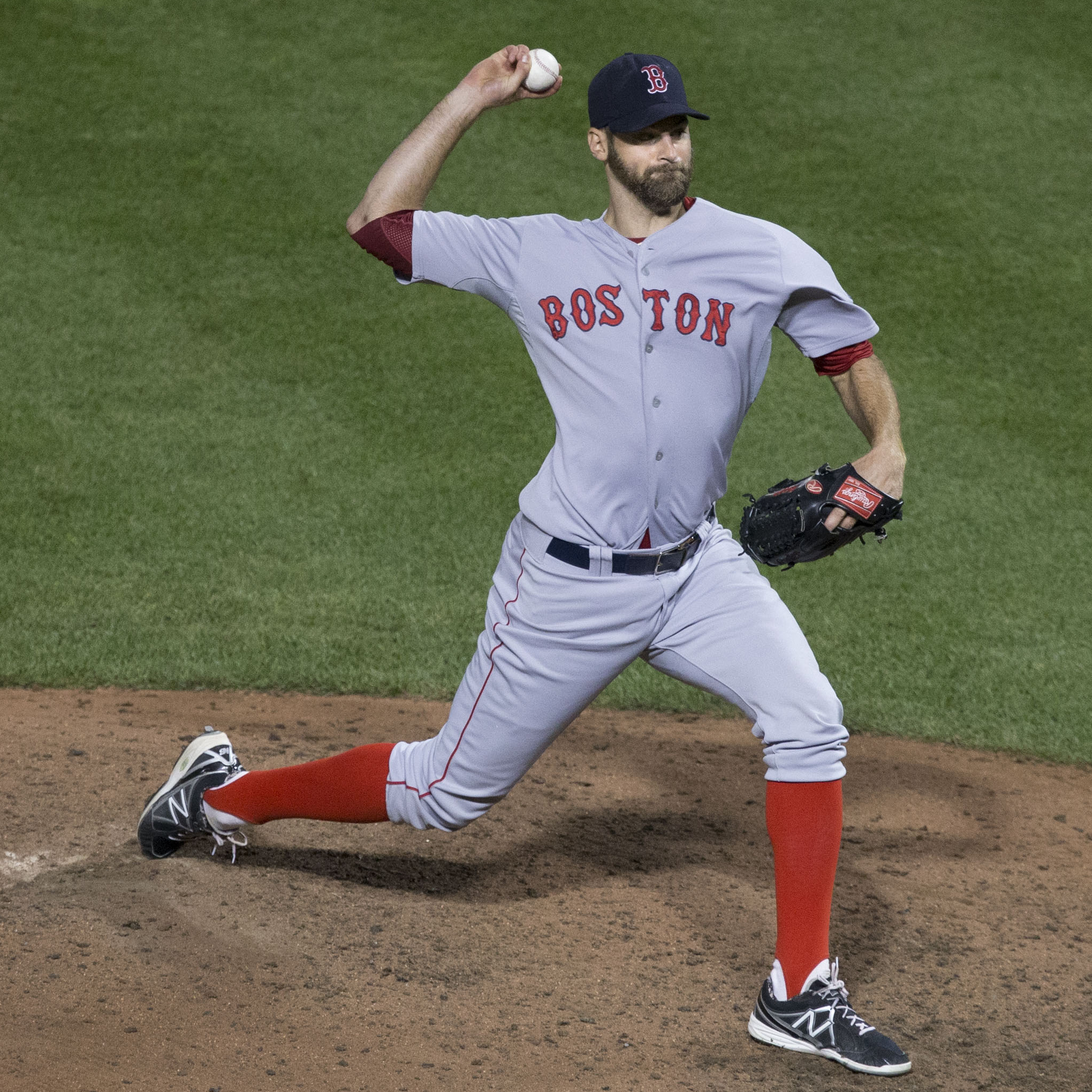 Burke Badenhop